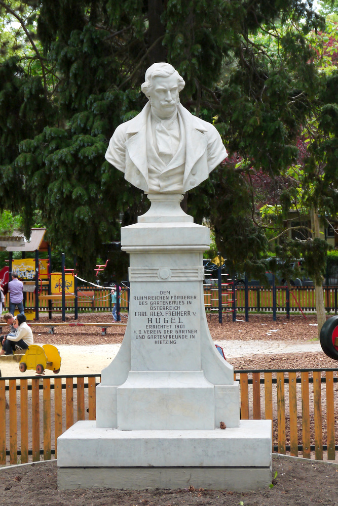 Hügeldenkmal